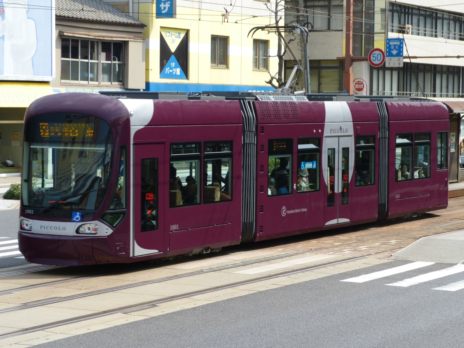 広島電鉄1001号「PICCOLO」